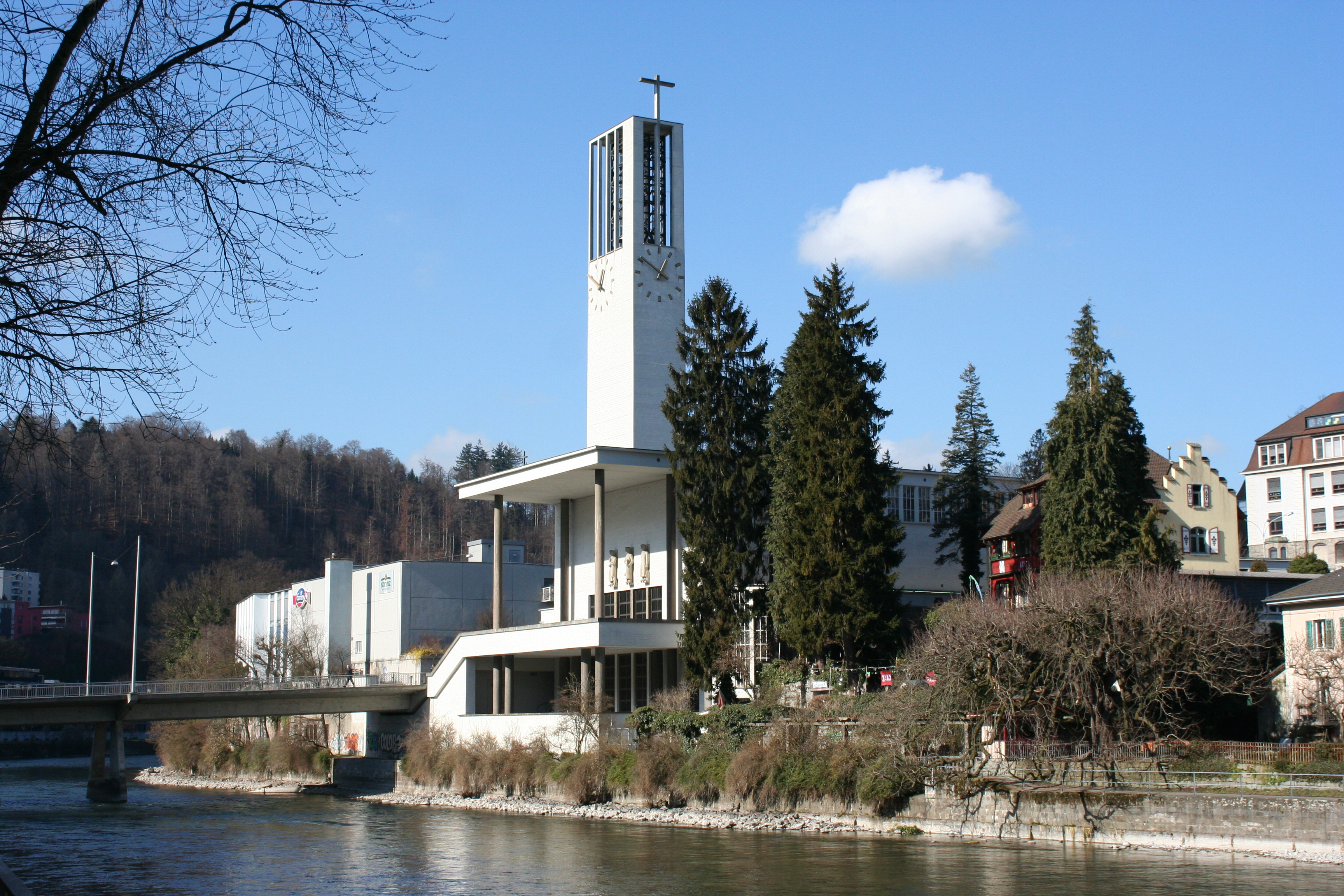 Römisch-katholische Pfarrkirche Sankt Karl Luzern